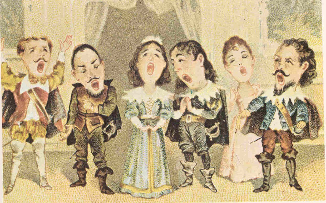 Cartoon van onbekende auteur van het Sextet uit de opera Lucia di Lammermoor van Gaetano Donizetti.